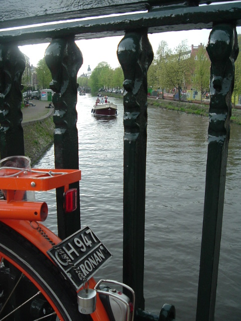 A Swedish army-bike (Kronan) in Amsterdam